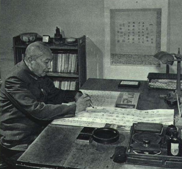 1963-07 1963年 谢无量